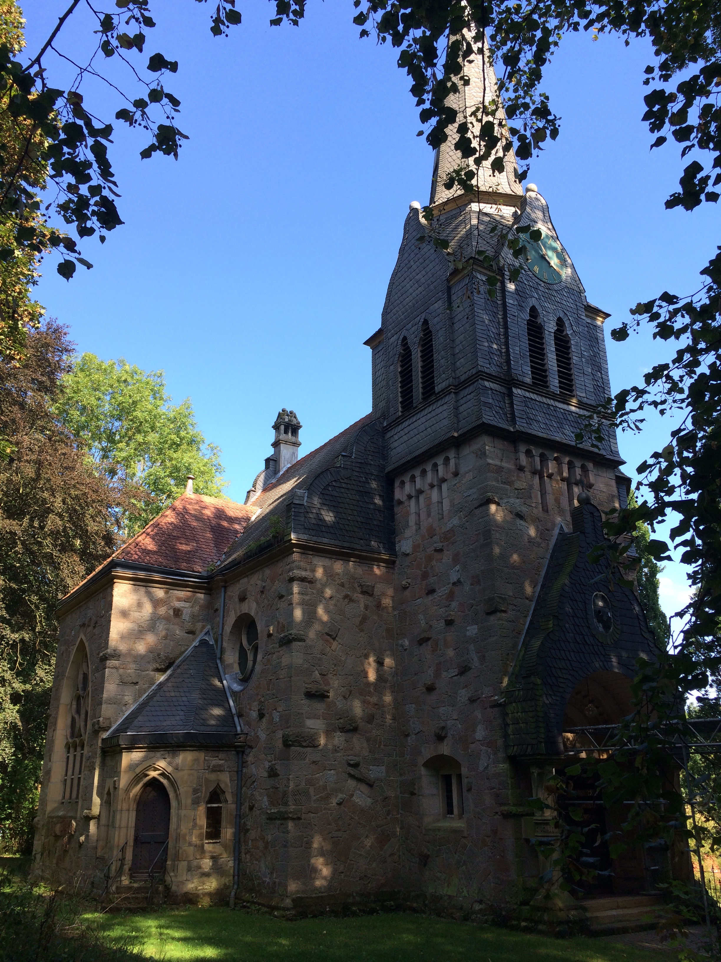 Außenansicht der Evangelischen Kirche Holzhausen, gelegen auf einer Anhöhe zwischen Holzhausen und Hohenhaus. Entlang der Kirche verläuft der Werra-Burgen-Steig Hessen (X5H).